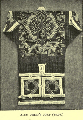 Dictionnaire de John Batchelor (1854-1944), The Ainu of Japan, 1892 ː tunique de chef vue de dos.